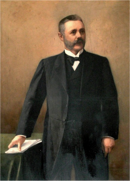 Németh István, Kaposvár városépítő polgármestere.